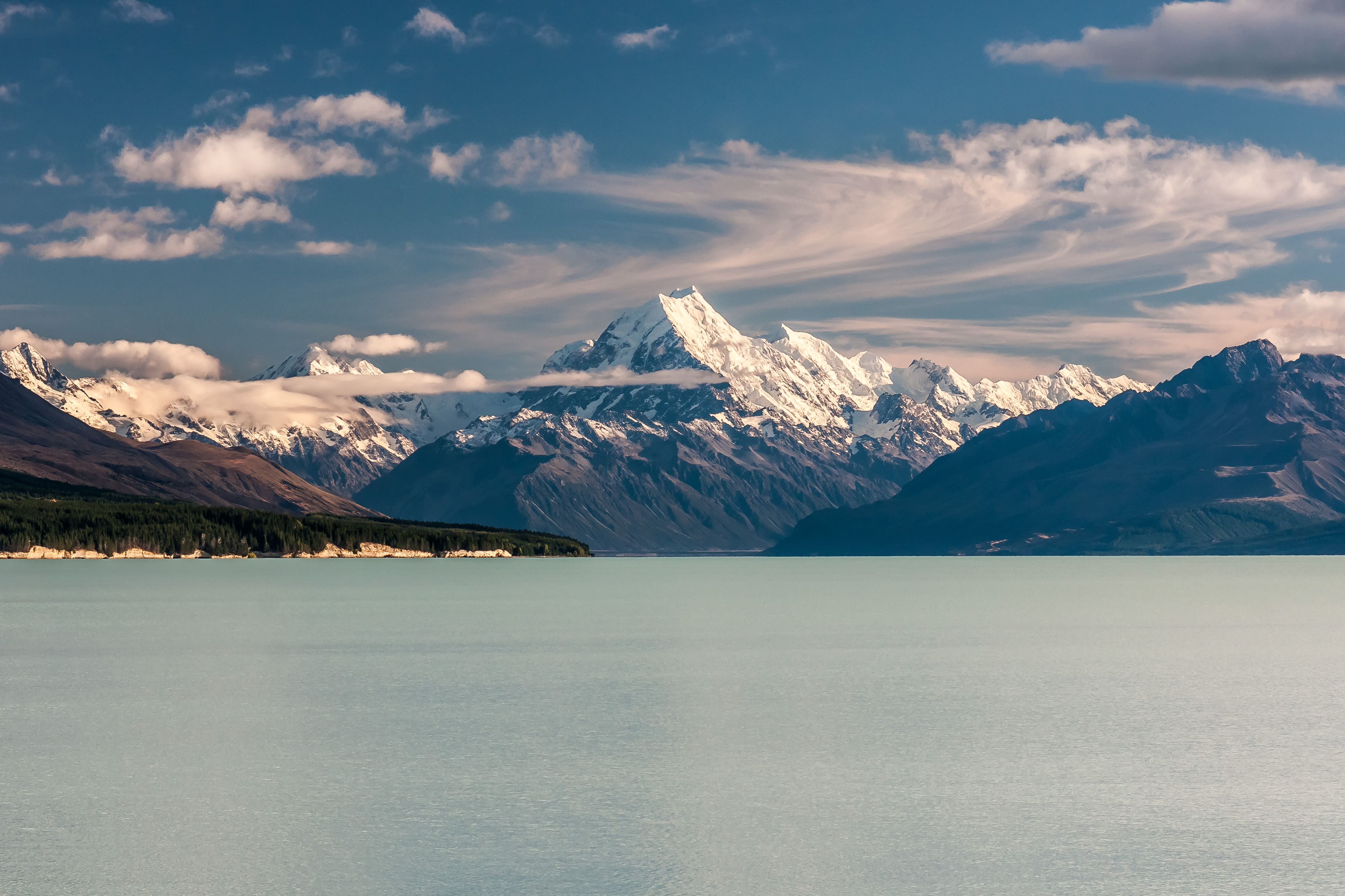 Aoraki over Lake Pukaki